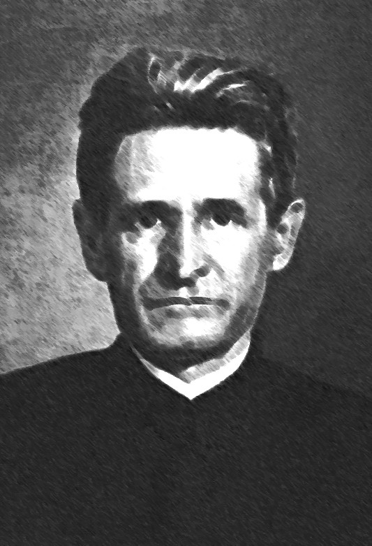 Pater Rupert Mayer